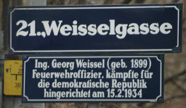 Strassentafel Wien 21, Weissel